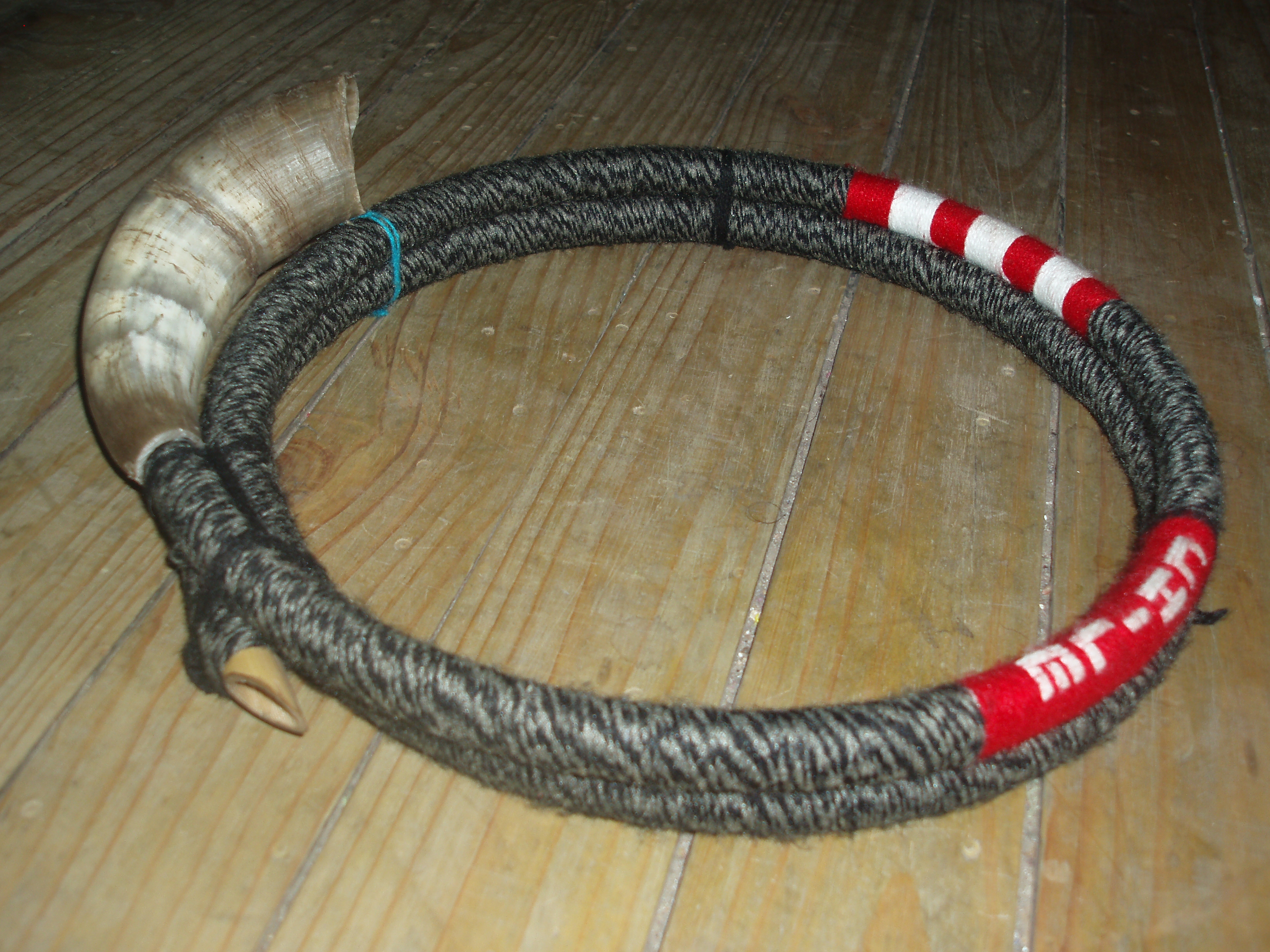 Trutruka, Musikinstrument der Mapuche